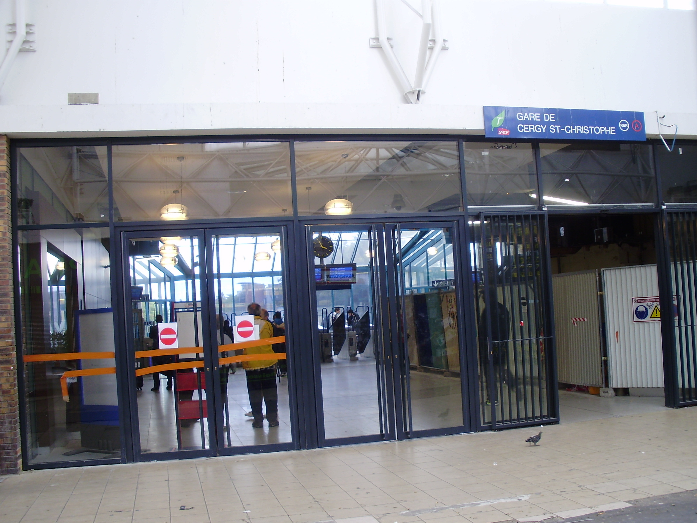 Gare de Cergy-Saint-Christophe, à Cergy, Val-d'Oise, France : entrée de la gare, dans le passage de l'Horloge